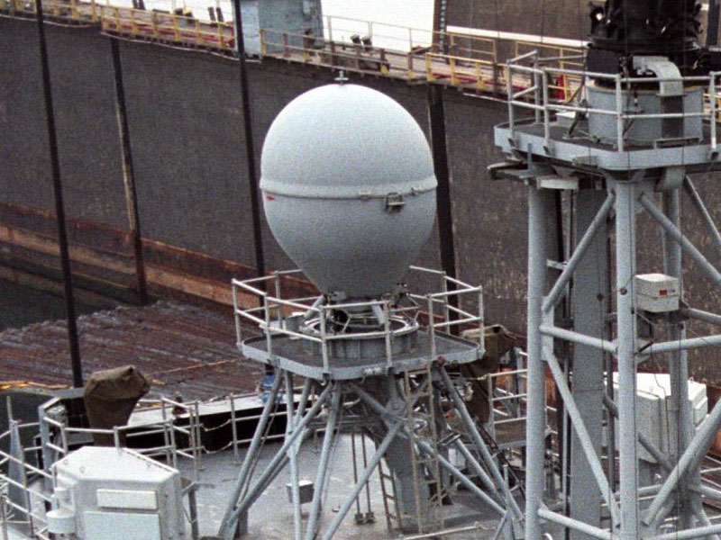 Антенная система CAS на фрегате FFG-46 «Ренц» типа «Оливер Перри»